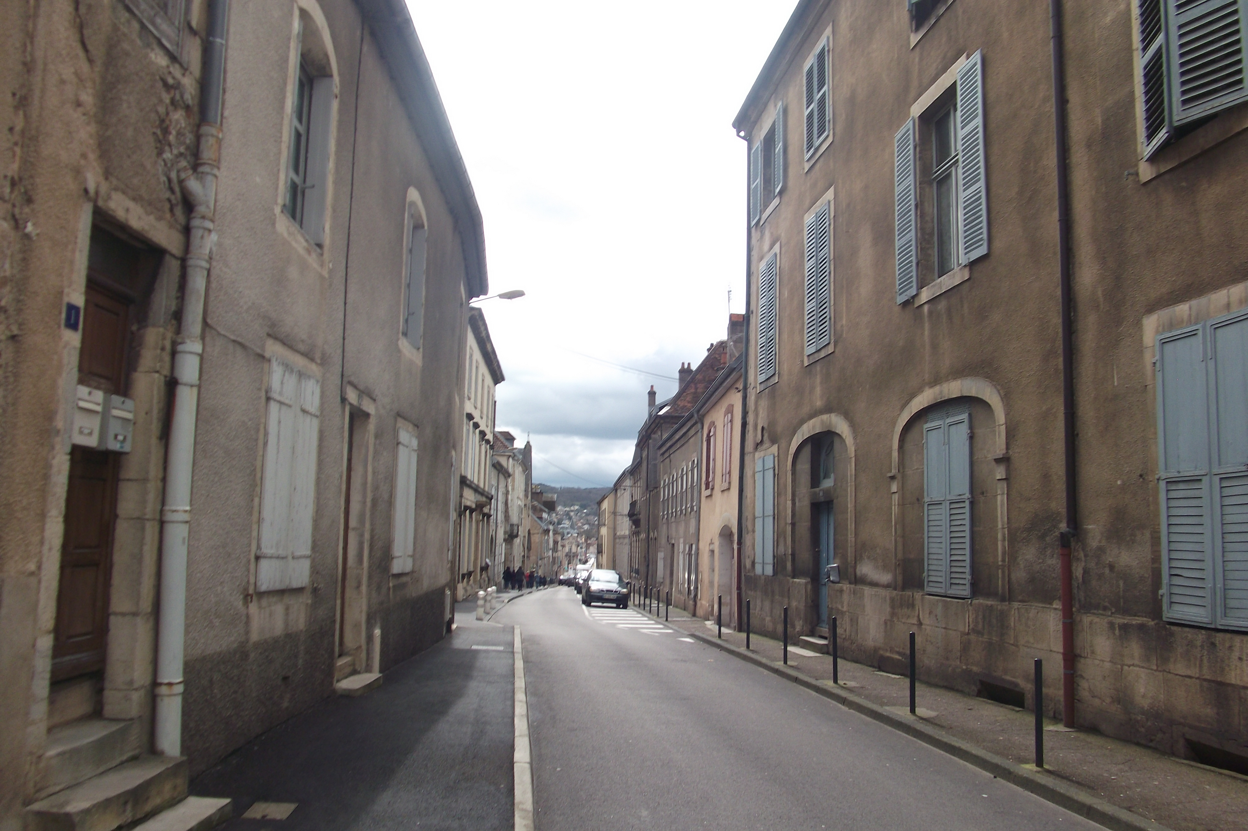 La rue Saint-Georges dans le centre-ville de Vesoul (Haute-Saône, Franche-Comté)